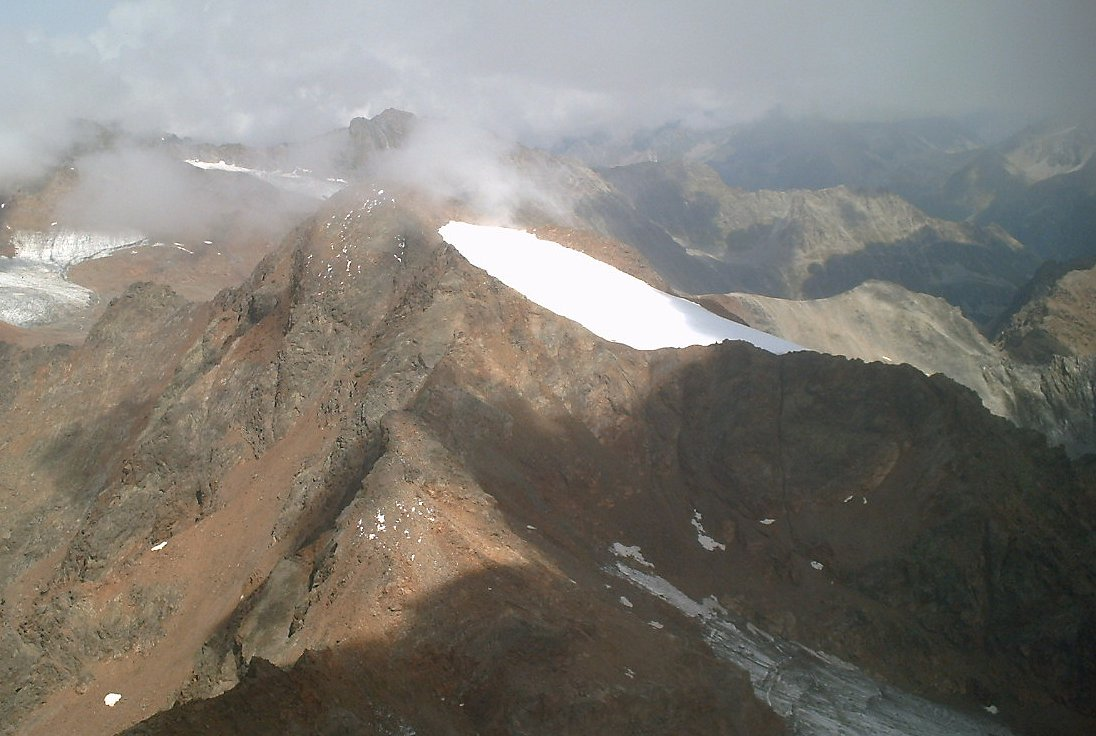 Eiskastenspitze, Ötztaler Alpen, Tirol